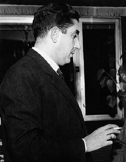 Sergio Antonielli (1920 - 1982)